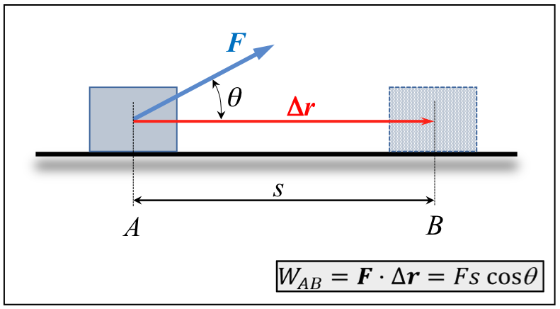 Indar konstante batek plano horizontalean higitzen ari den objektuan eginiko lanaren eskema grafikoa